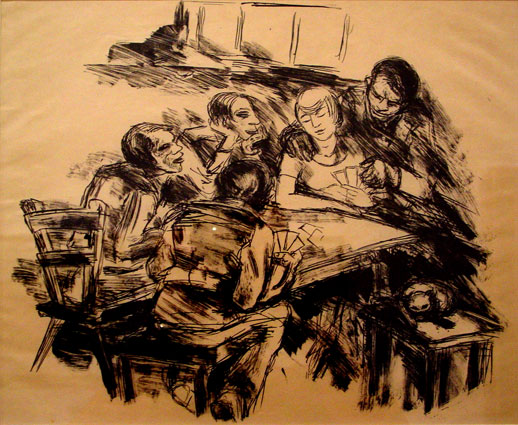 Maria Luiko Radierung ohne Titel, ohne Datum